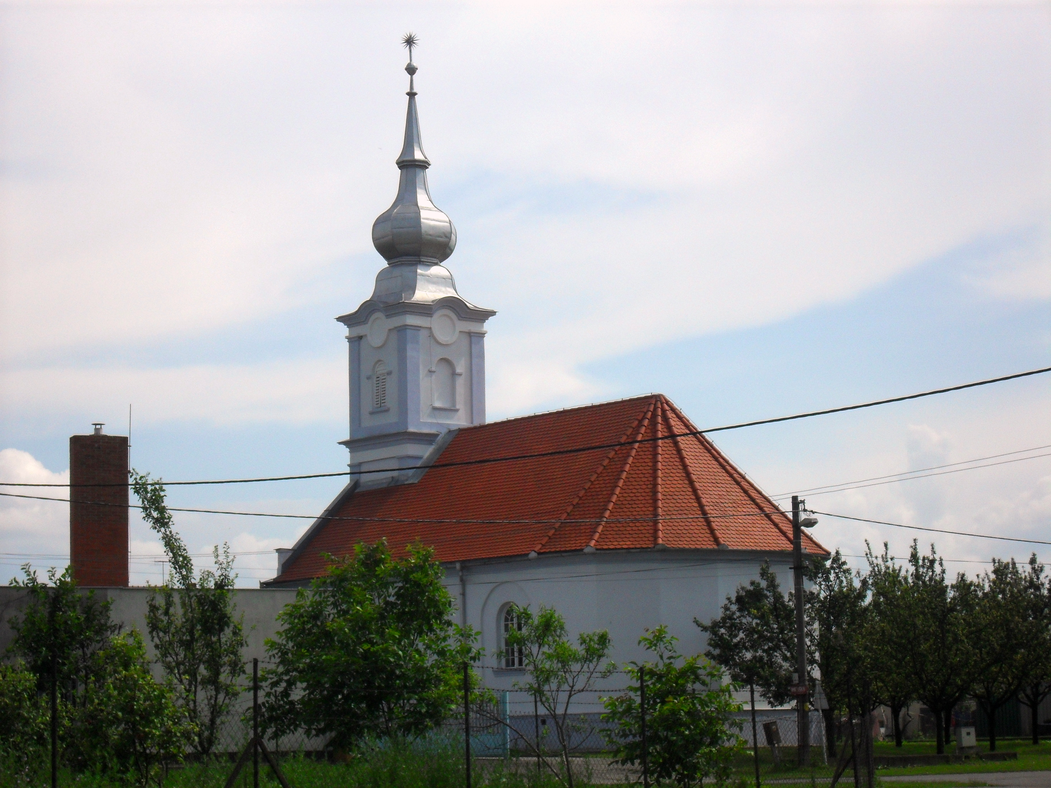 Tany - református templom